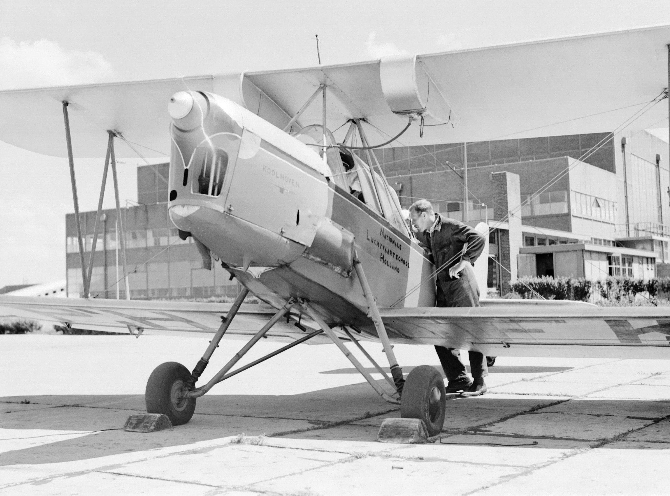 Collectie / Archief : Fotocollectie Van de Poll Reportage / Serie : Nationale Luchtvaartschool Holland Beschrijving : Een mecanicien praat met de adspirant piloot van het Koolhoven-FK 46 lesvliegtuig bijgenaamd 'Koe of Koebeest' vanwege zijn dociele vlieggedrag van de Nationale Luchtvaart School Holland te Amsterdam Schiphol Annotatie : De Nationale Luchtvaart School Holland was gevestigd in Rotterdam Waalhaven en Amsterdam Schiphol Datum : 1933 Locatie : Amsterdam, Rotterdam Trefwoorden : leerlingen, monteurs, piloten, vliegopleidingen, vliegtuigen Persoonsnaam : Frits Koolhoven Fotograaf : Poll, Willem van de Auteursrechthebbende : Nationaal Archief Materiaalsoort : Negatief (zwart/wit) Nummer archiefinventaris : bekijk toegang 2.24.14.02 Bestanddeelnummer : 255-8623